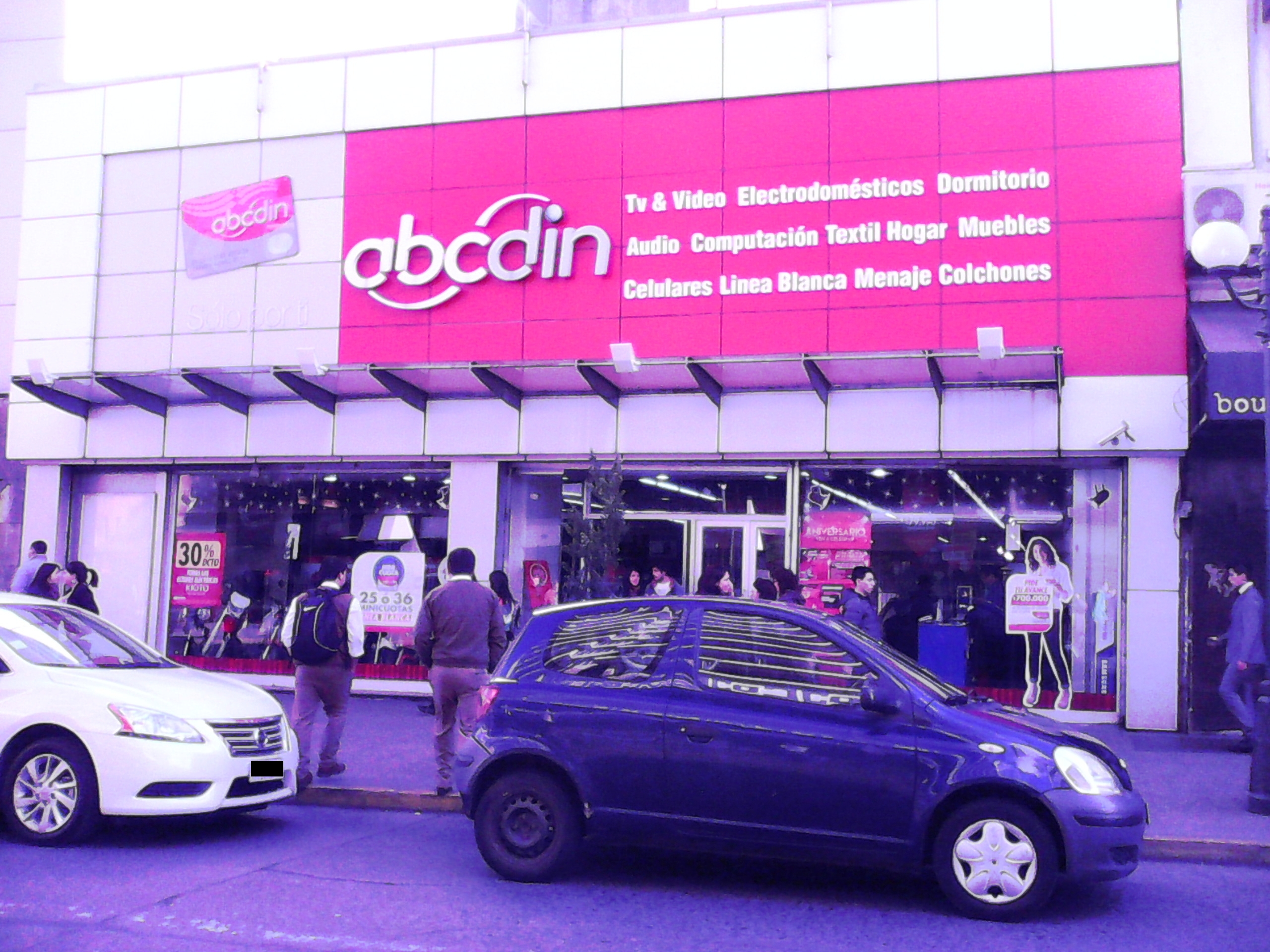 Sucursal de la cadena chilena de tiendas Abcdin, en la avenida Arturo Prat, en el sector Centro de la ciudad de Temuco.